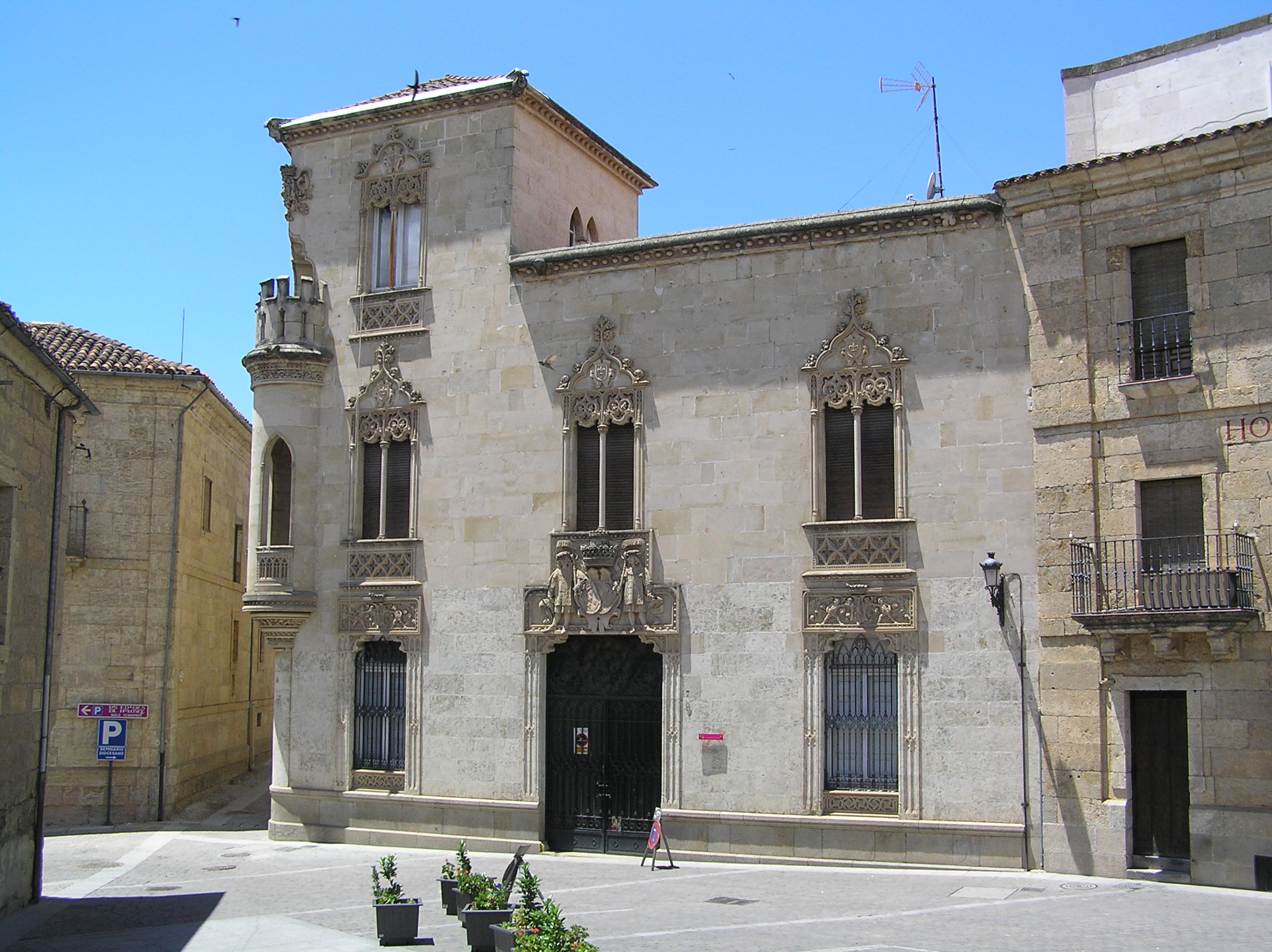 Palacio de la Marquesa de Cartago. Vista general desde la Plaza de San Salvador. Ciudad Rodrigo (provincia de Salamanca, España)